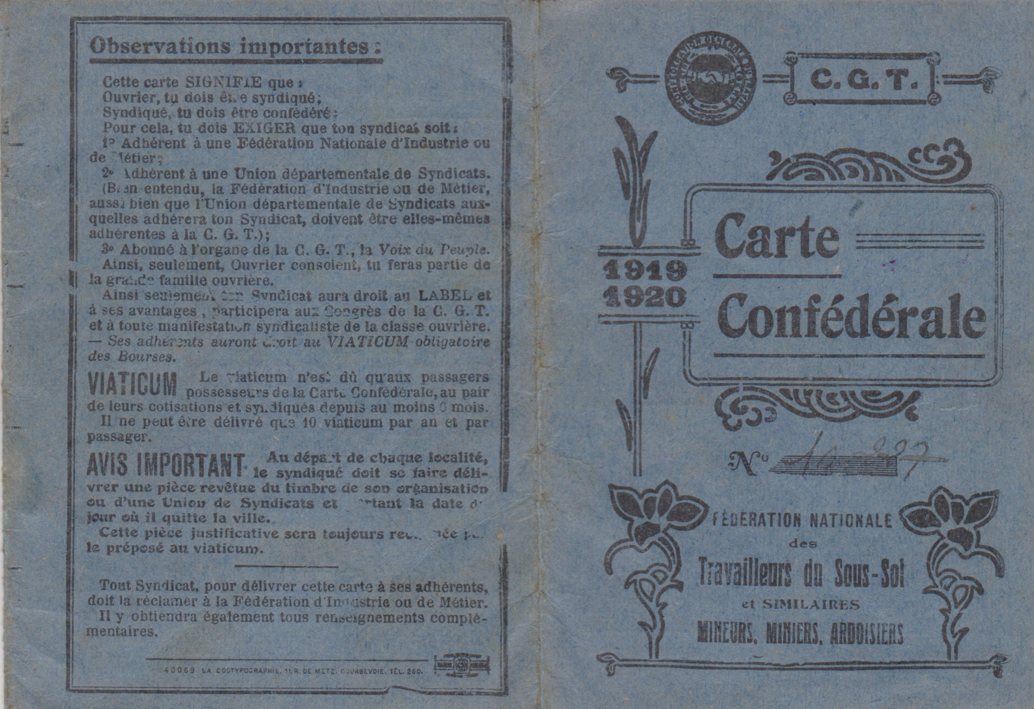 Carte d'adhérent à la Fédération CGT (France) du Sous-sol ( fédération des mineurs, miniers et ardoisiers) pour les années 1919-1920 (recto)